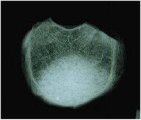 Wirbelkörper nach Auffüllung mit vk100 - Elastoplastie